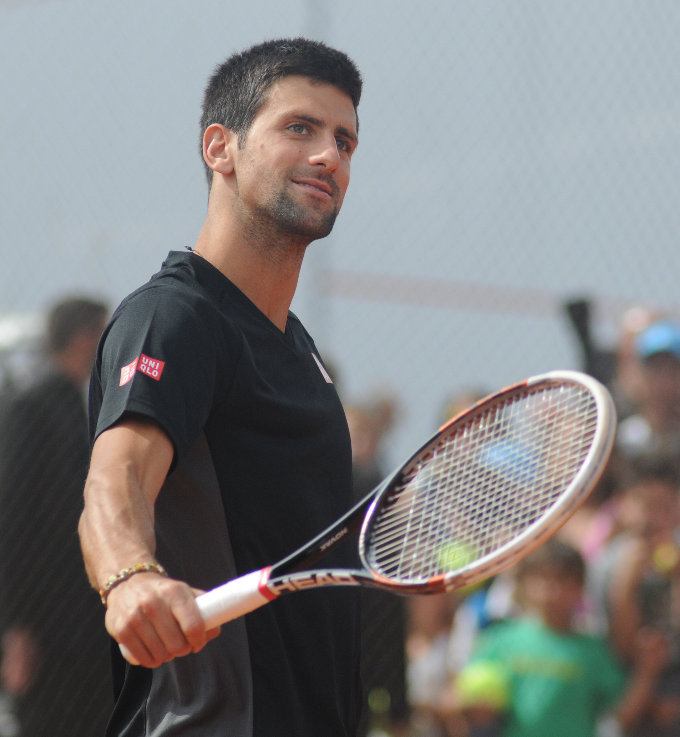 Novak Đoković at the 2014 Internazionali BNL d'Italia